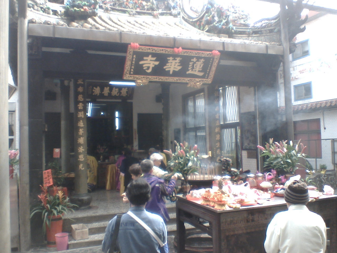 桃園蓮華寺內殿